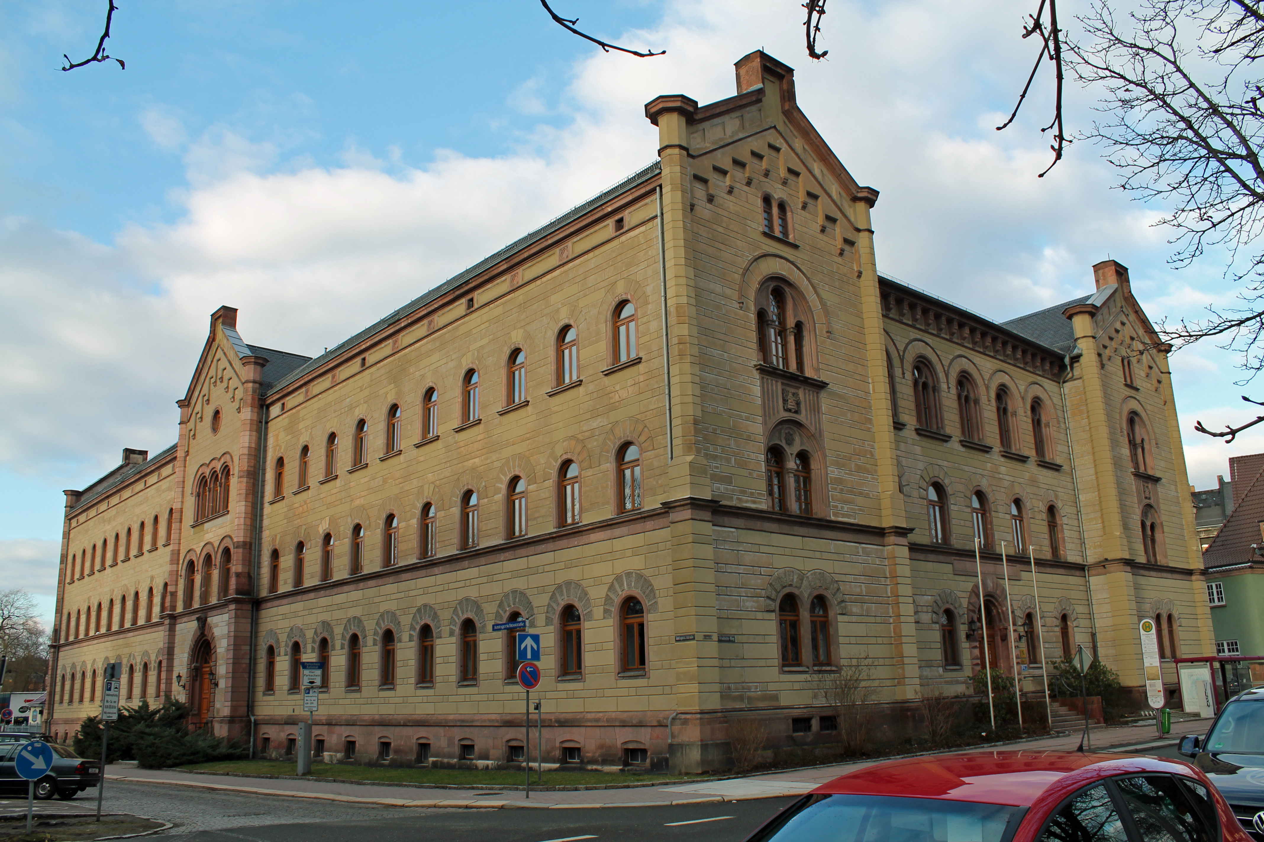 Das frühere Amtsgerichtsgebäude von Zwickau, das jetzige Finanzamt. Zwickau, Sachsen, Deutschland.